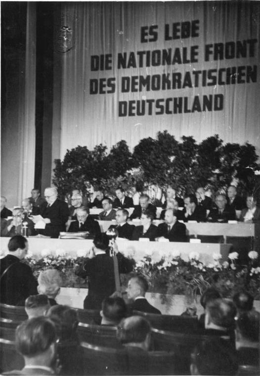 Zentralbild-Heilig Gründung der Deutschen Demokratischen Republik am 7.10.1949 Im Gebäude der DWK ( Deutsche Wirtschafts-Kommission) in der Leipziger Straße in Berlin fand am 7.10.1949 die 9. Tagung des Deutschen Volksrates statt, auf der die DDR gegründet und das Manifest "Die Nationale Front des demokratischen Deutschland" verabschiedet wurde. U.B.z: Wilhelm Pieck verliest das Manifest der Nationalen Front des demokratischen Deutschland. v.r.n.l.: 1.Reihe Walter Ulbricht, Wilhelmine Schirmer-Pröscher, Dr. Lother Bolz, Otto Nuschke im Präsidium. 4128-49"